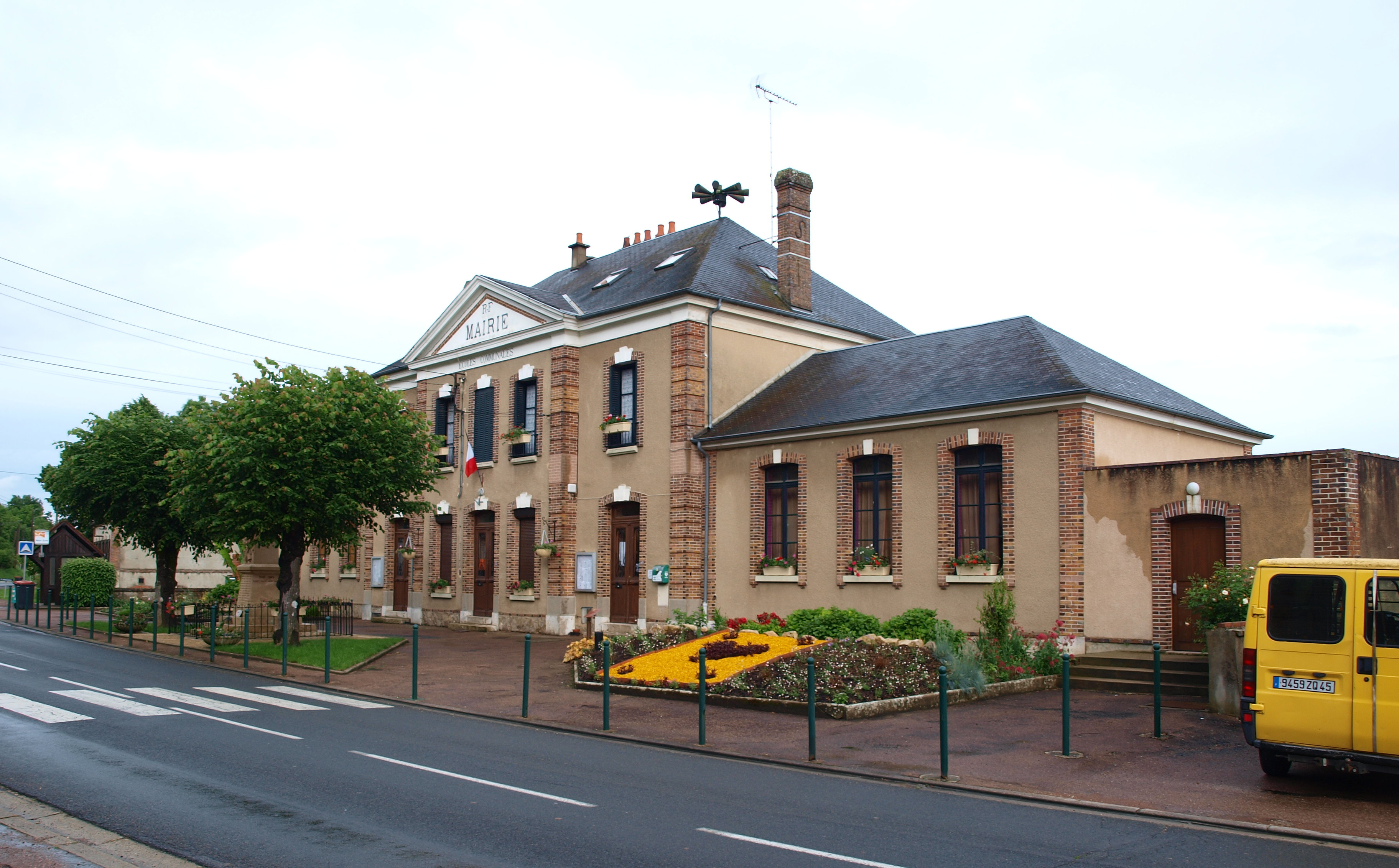 Chantecoq (Loiret, France) ; mairie